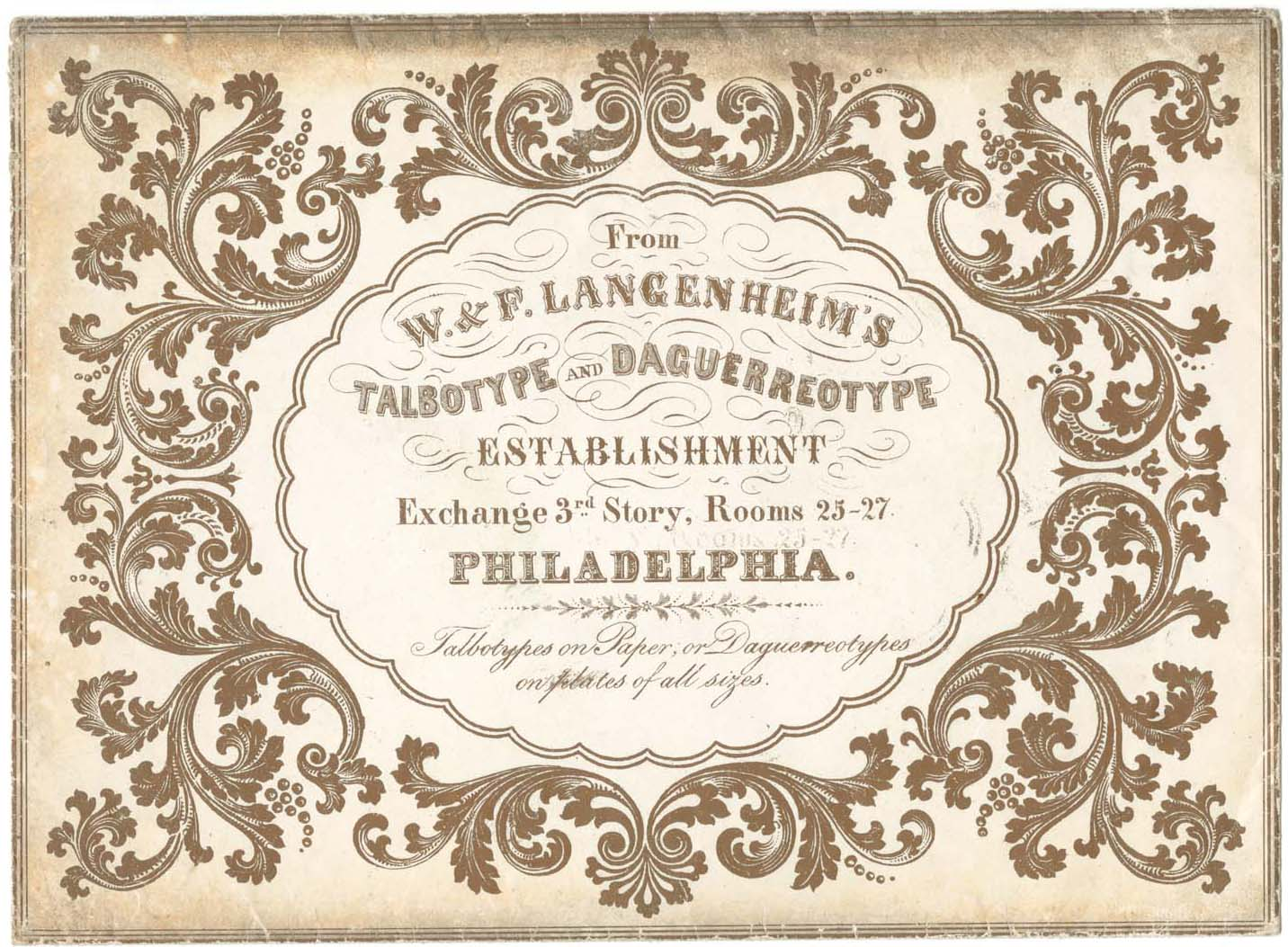 Langenheim Brothers Advertising Envelope, ca. 1849.